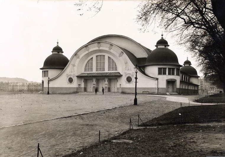 Concert hall, Göteborg. Foto taget från Södra Vägen/Gamla Alléen. Längs Hedens långsida syns bostadshus.